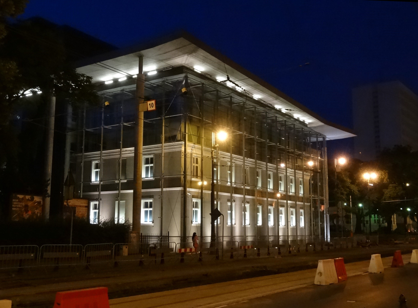 Dom Mody Drukarnia w Bydgoszczy - widok od ul. Jagiellońskiej